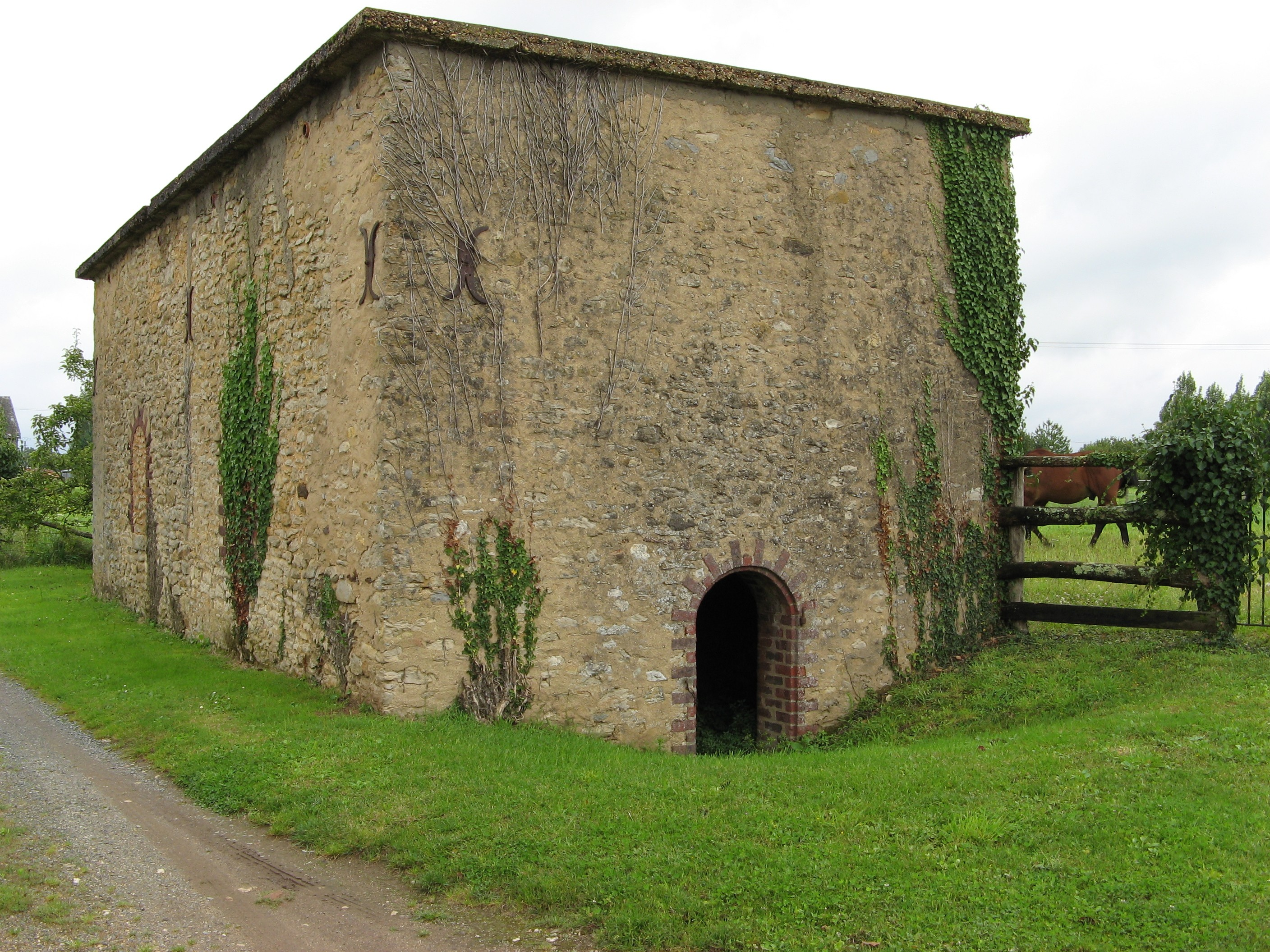 TELOCHE (Sarthe) - Four à Chanvre